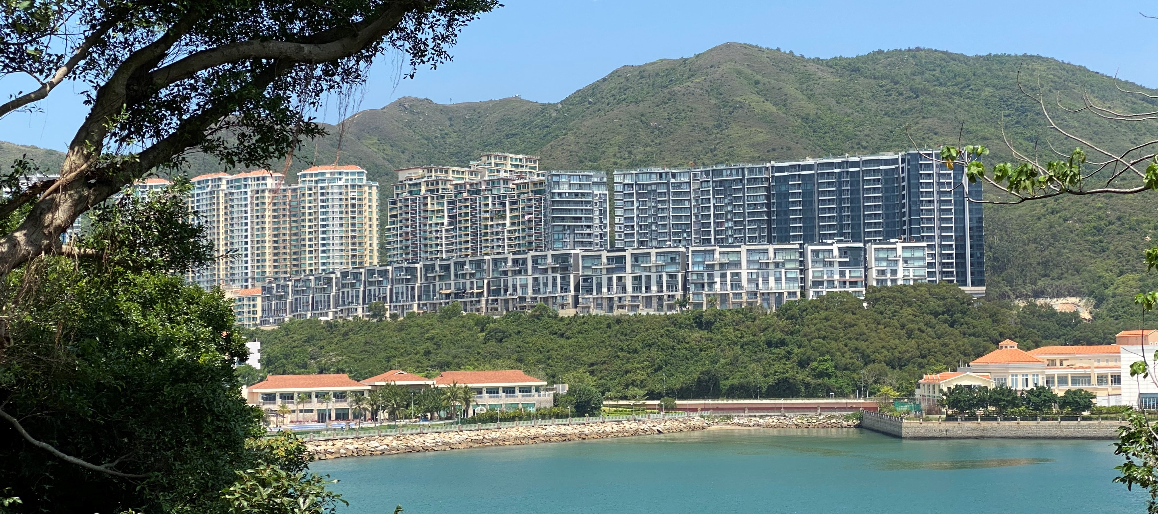 愉景灣北第12-16期